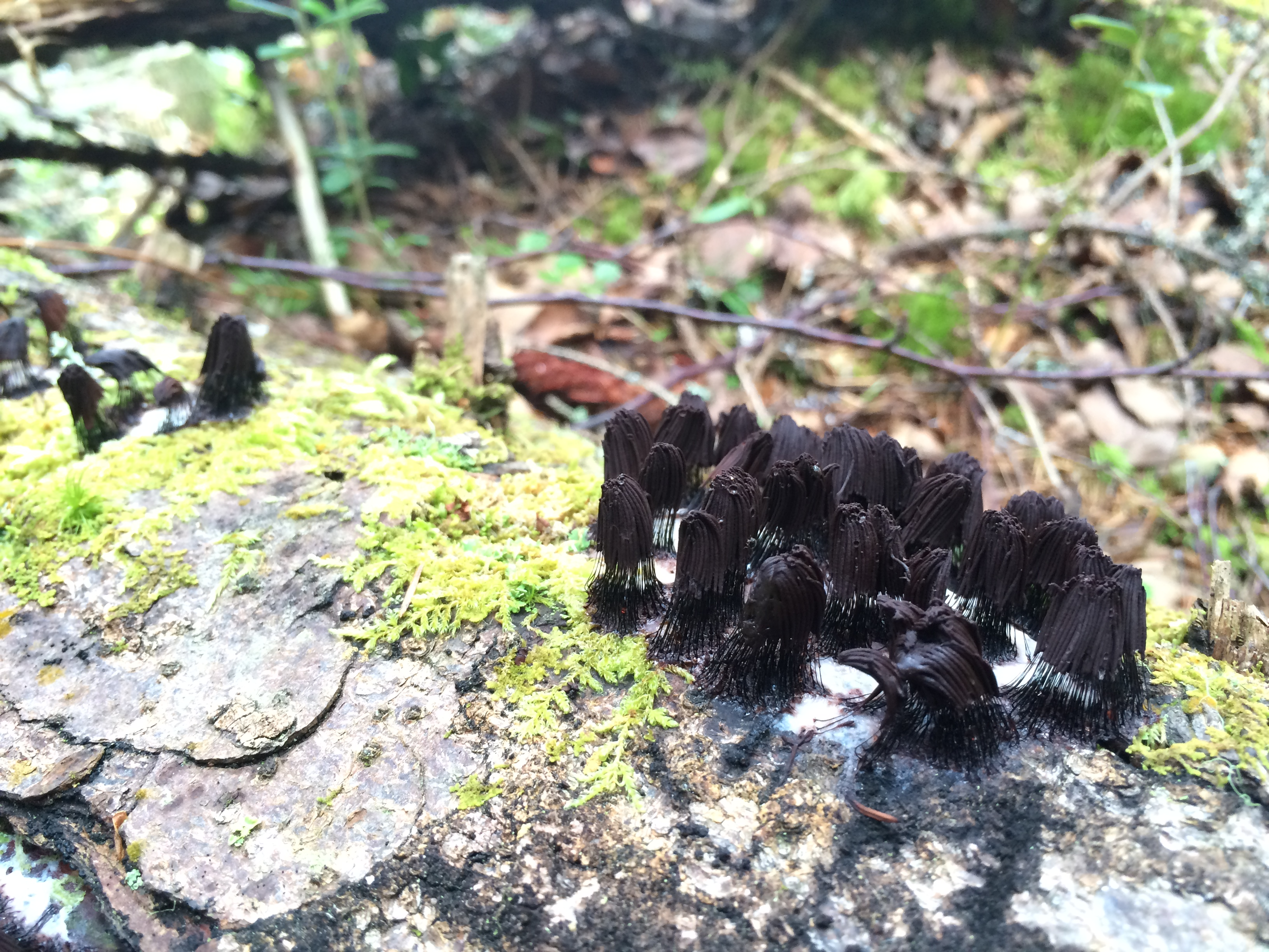 Samma exemplar av S. fusca i sin sporkroppsfas, fotograferad i Fillingen, Nordmaling den 15 juli 2016.